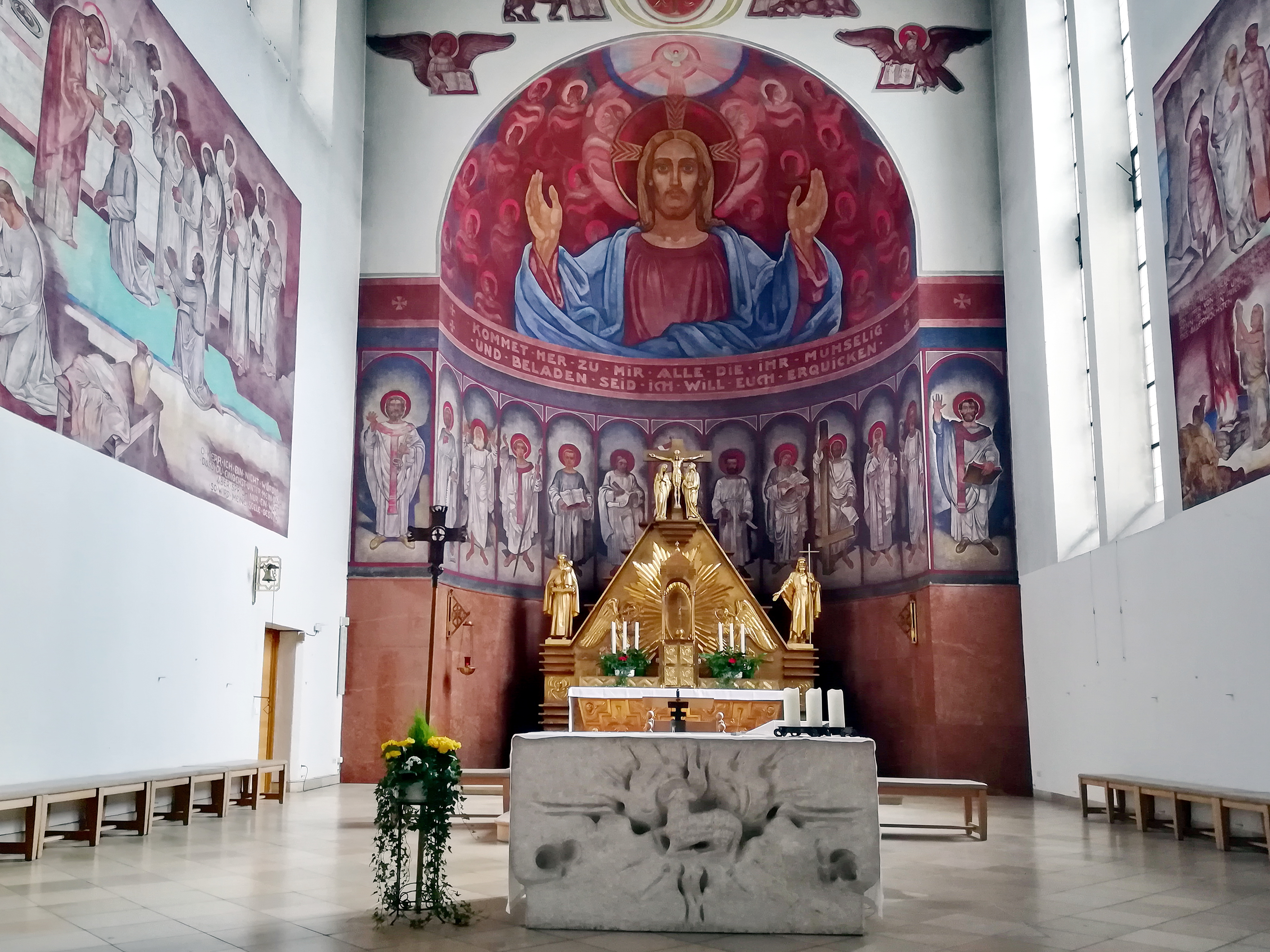 Die denkmalgeschützte katholische Pfarrkirche St. Anton steht in der Furtmayrstraße 22 im Kasernenviertel von Regensburg.